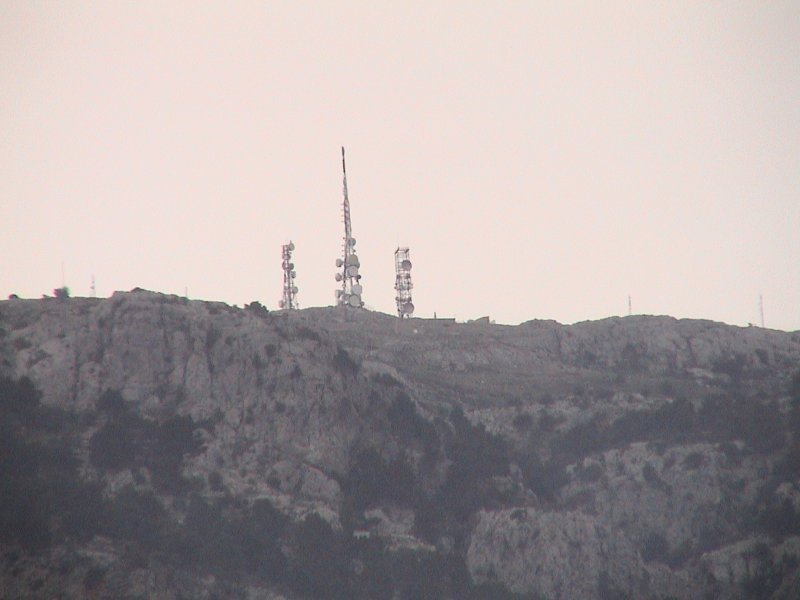 Antenes de la Serra d'Alfàbia, vistes des de la Vall de Sóller. Mallorca.